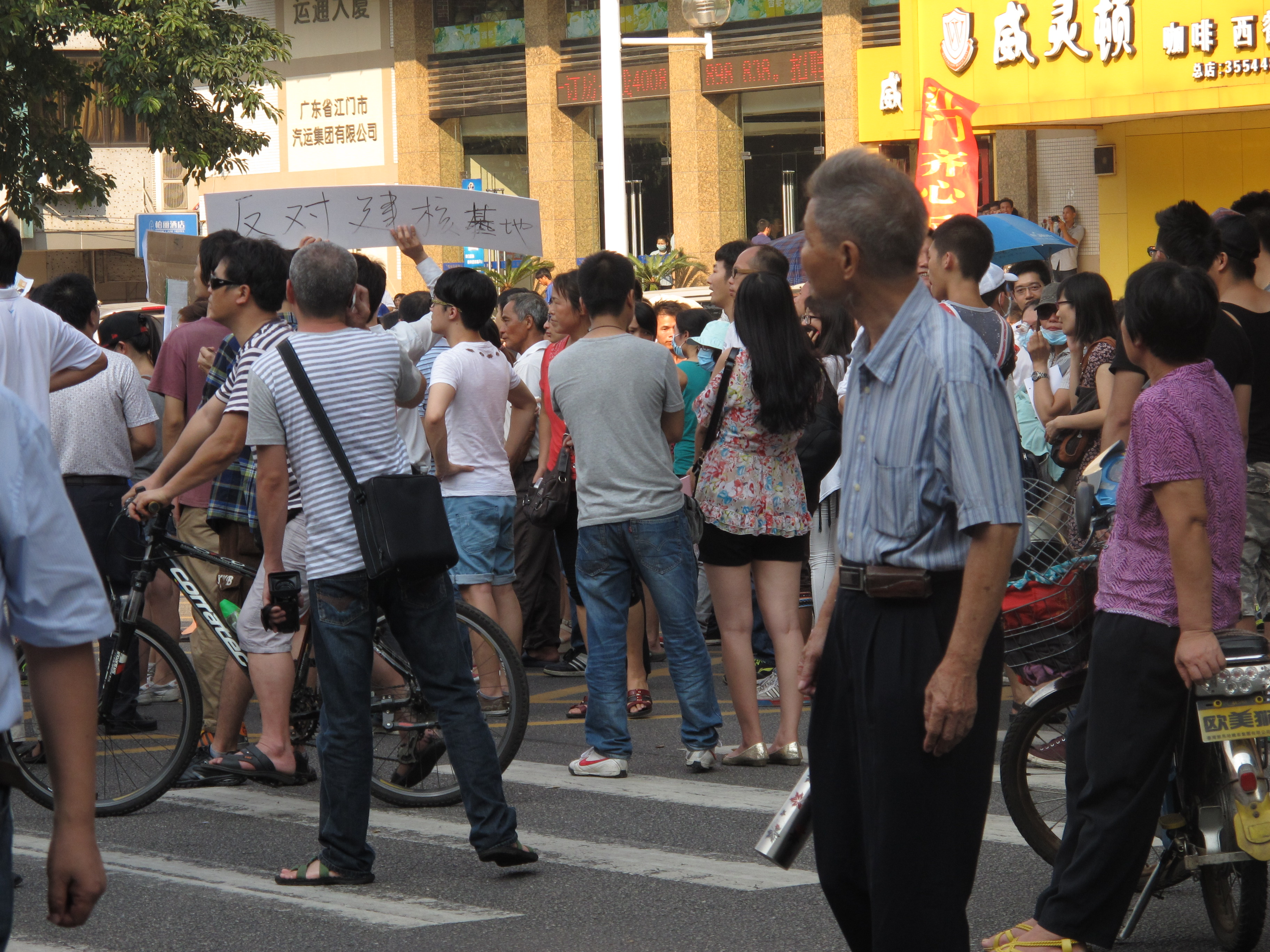 中文（中国大陆）: 反核抗议游行期间，有不少市民举起自制的标语